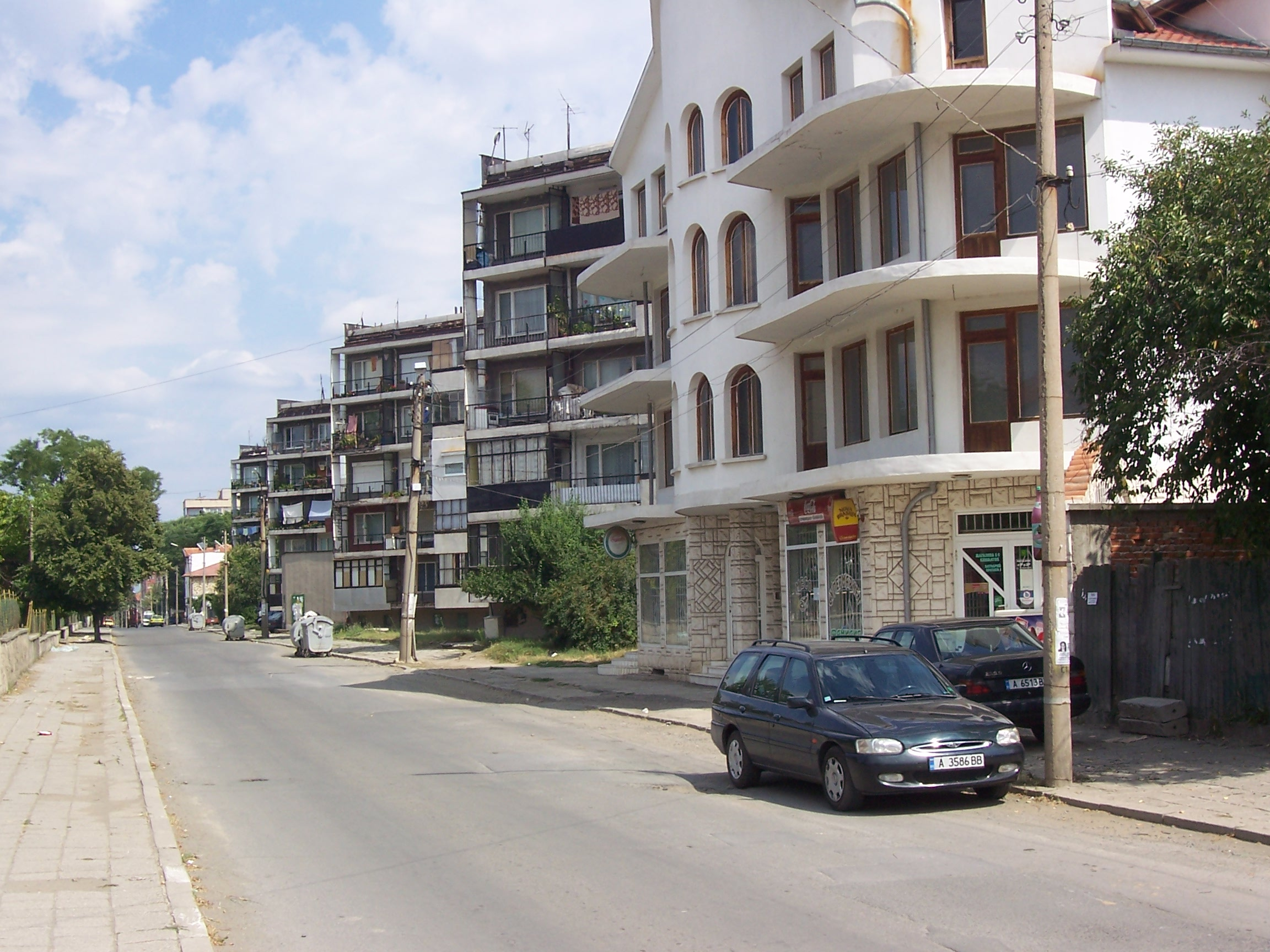 улица "Кирил и Методий"; © 2006 Димитър Колев